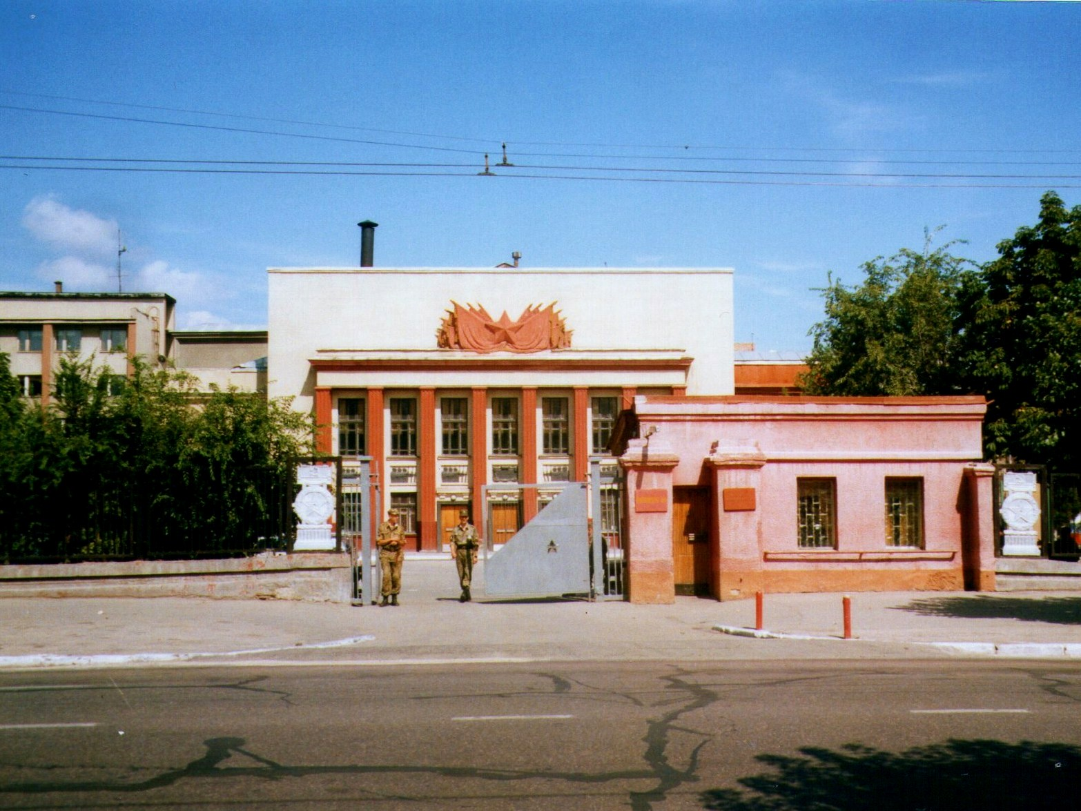 Саратовский военный институт ВВ МВД России (1999)